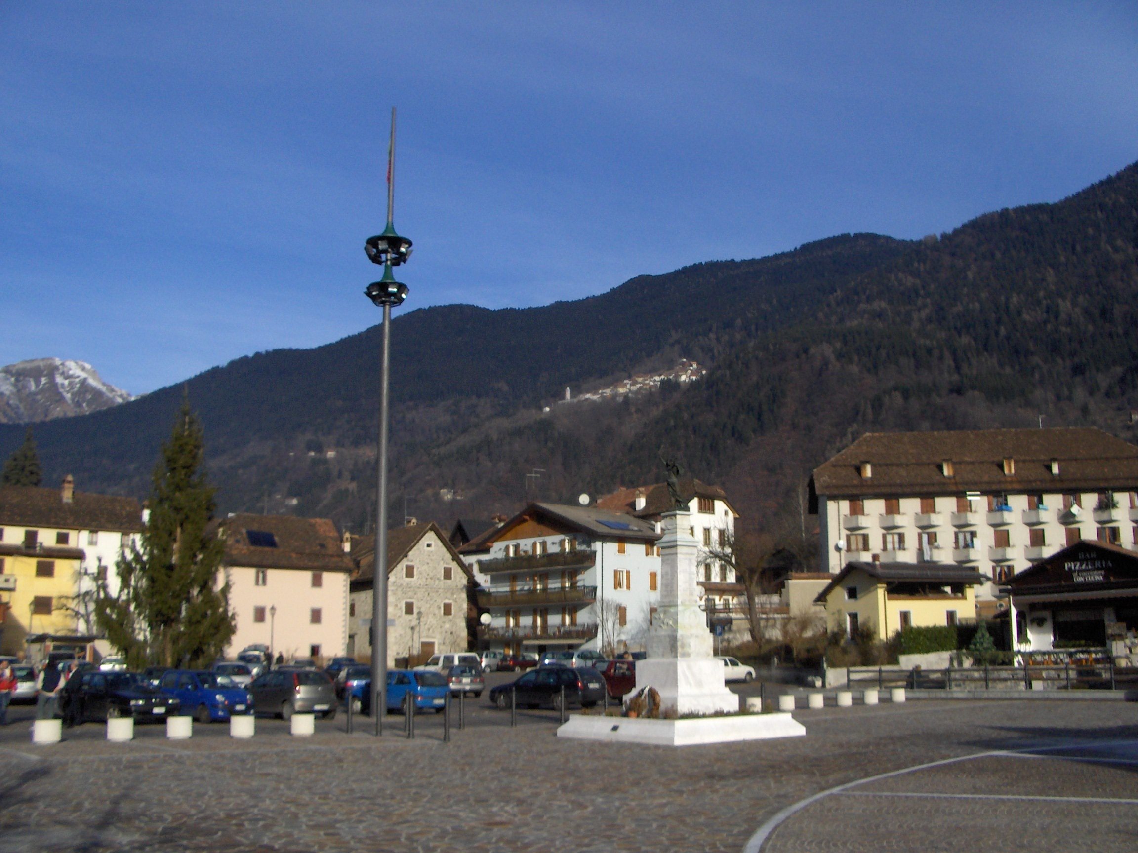 Sebi1, Piazza Durigon